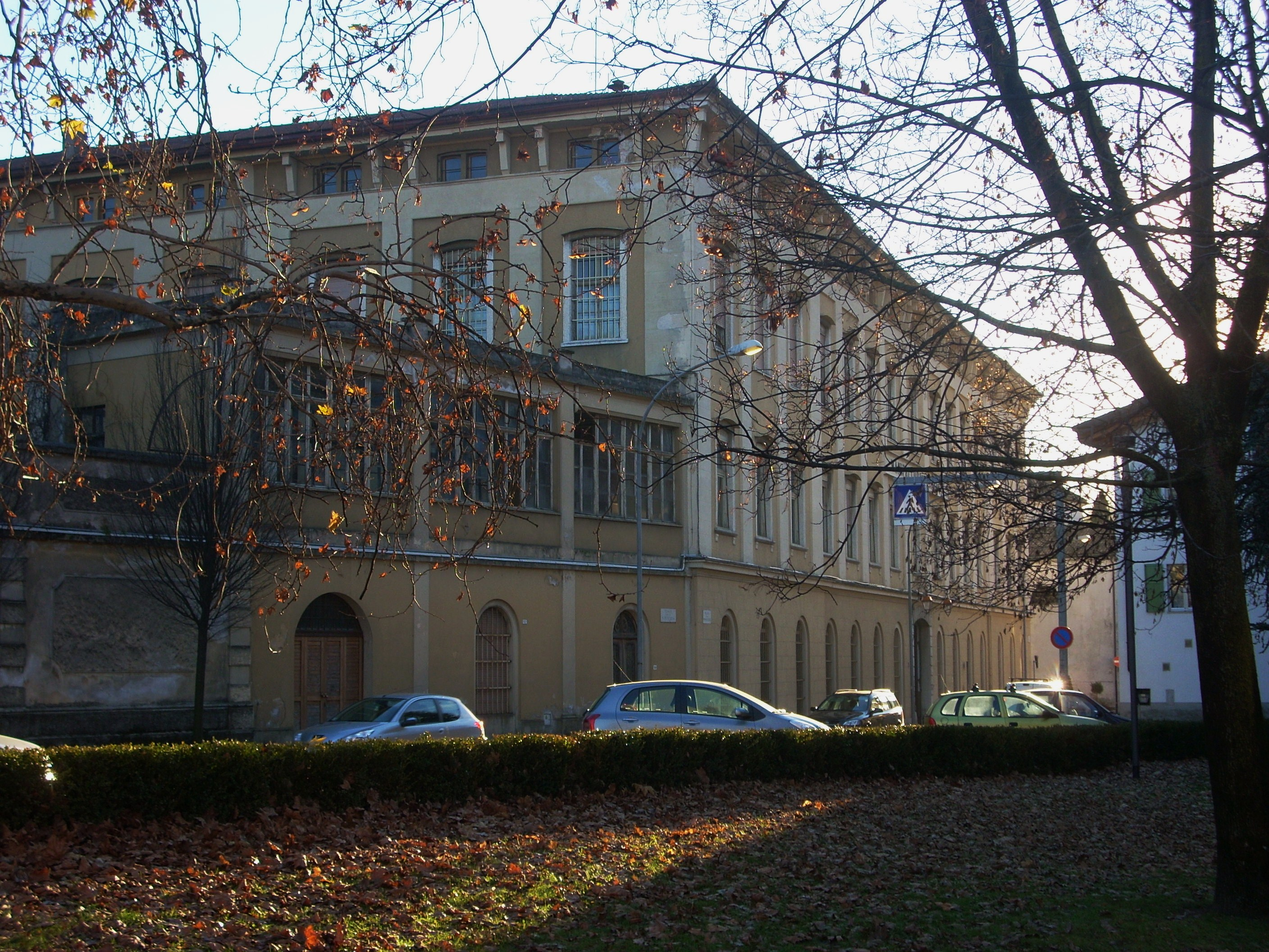 Manifattura tabacchi di Rovereto, lato nord